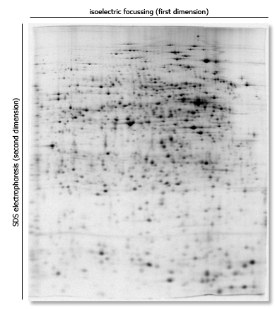 2D-Gel, Proteinextrakt aus dem Bakterium Bacillus subtilis